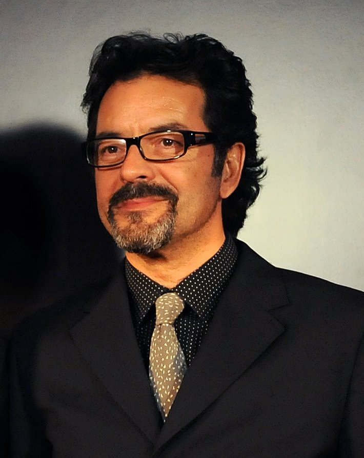 L'actor Abel Folk als Premis Gaudí 2011.